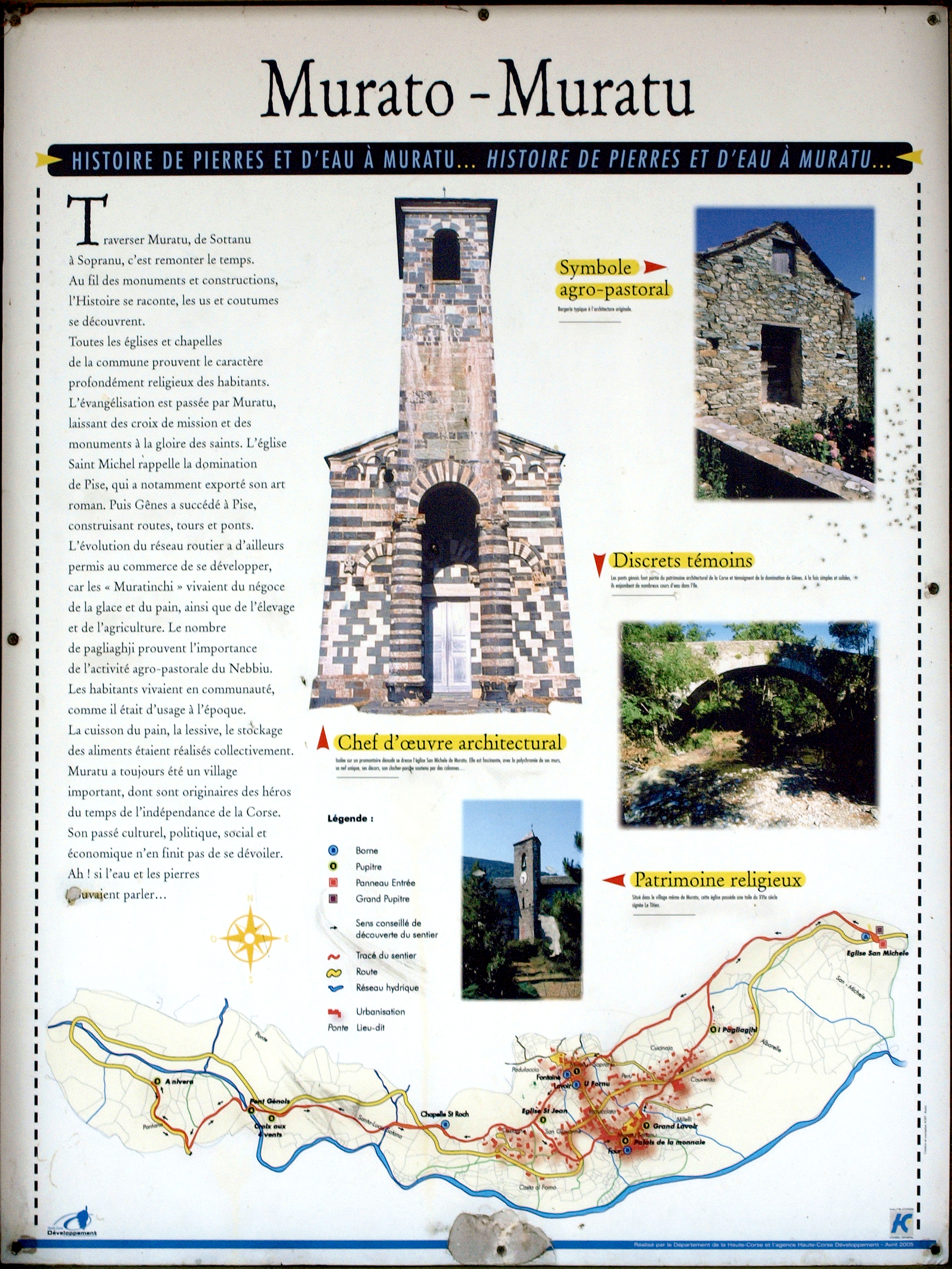 Murato (Corsica) - Panneau du sentier Histoire de pierres et d'eau à Muratu